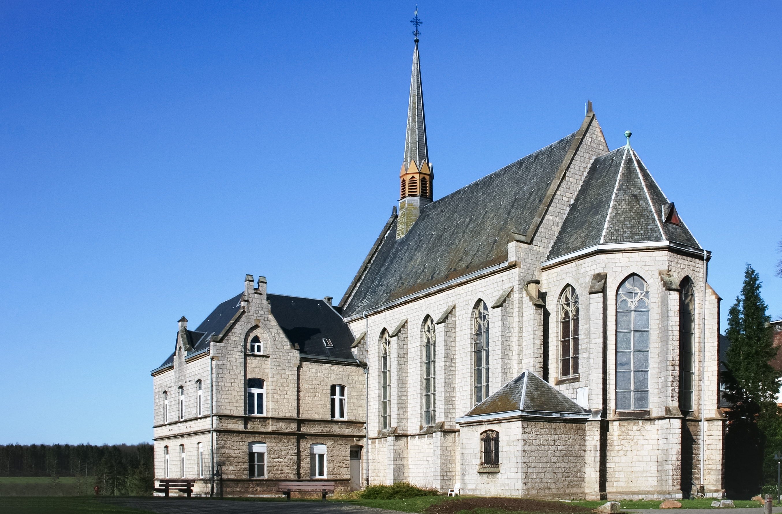 Kapell vum Katharinenstift zu Astenet.